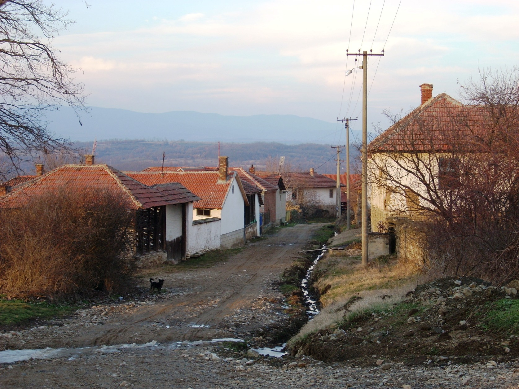 Slavnik